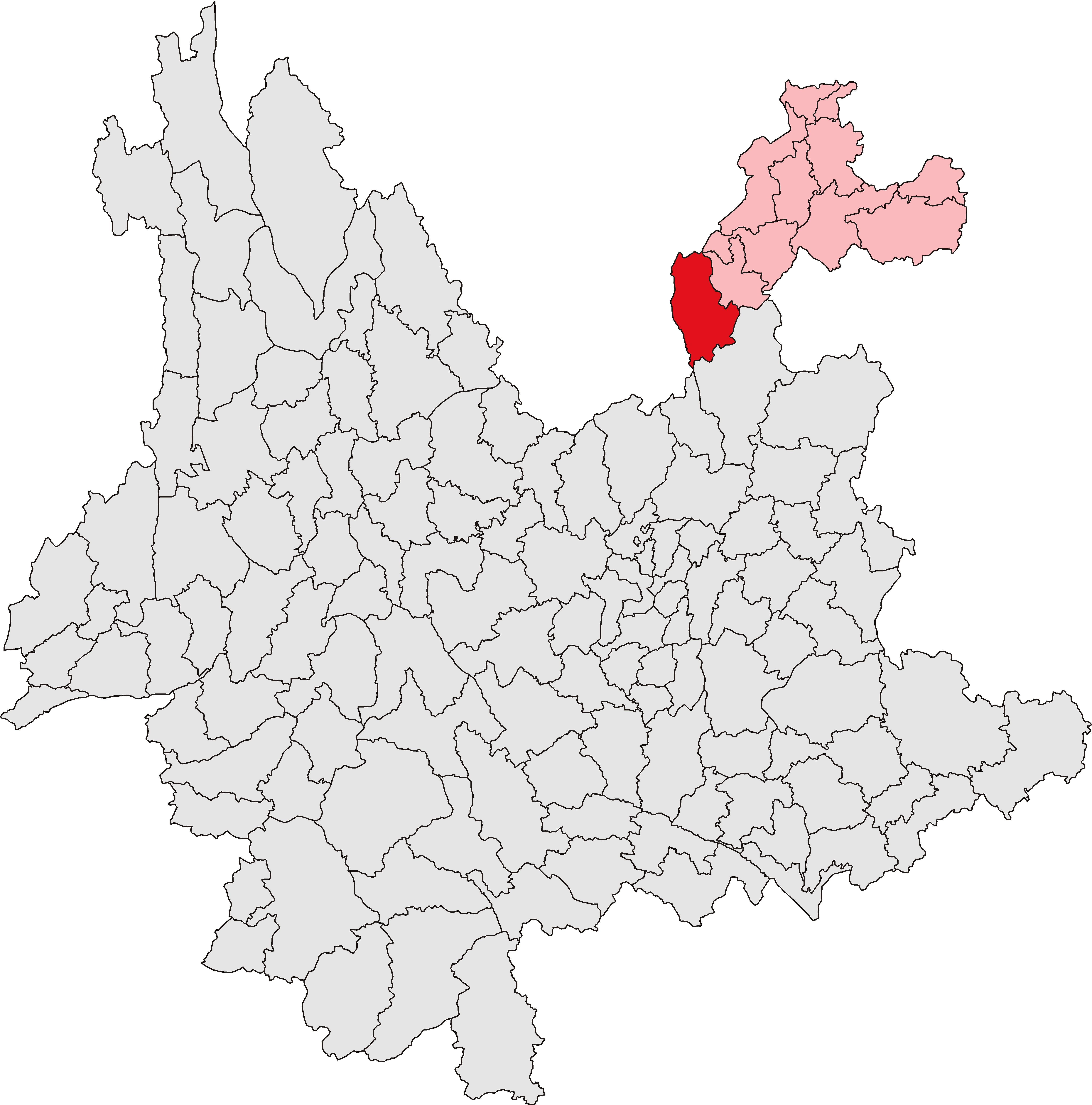 中文（中国大陆）: 巧家县位置图